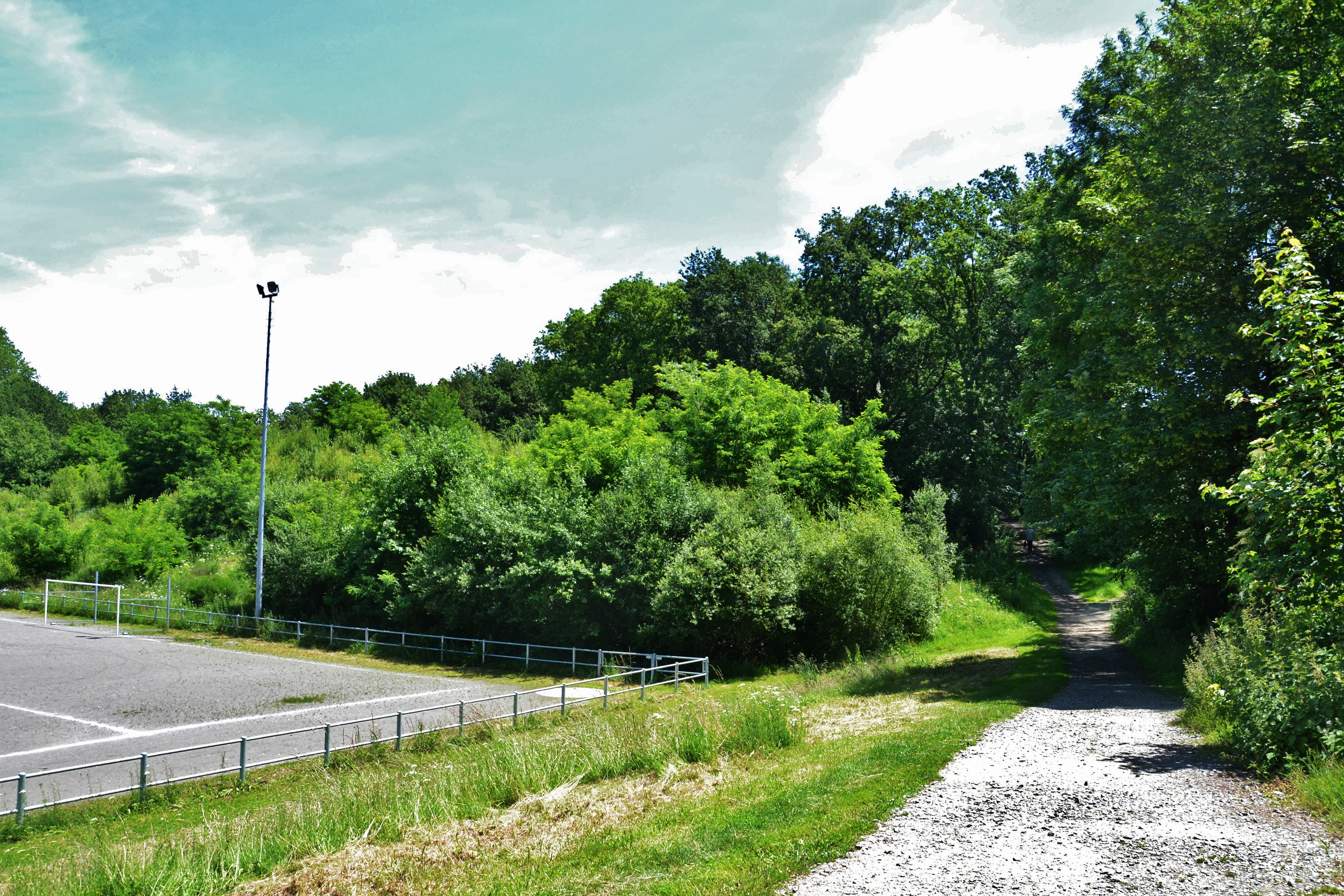 Arbres du parc de la Borie, Limoges (Haute-Vienne, France)